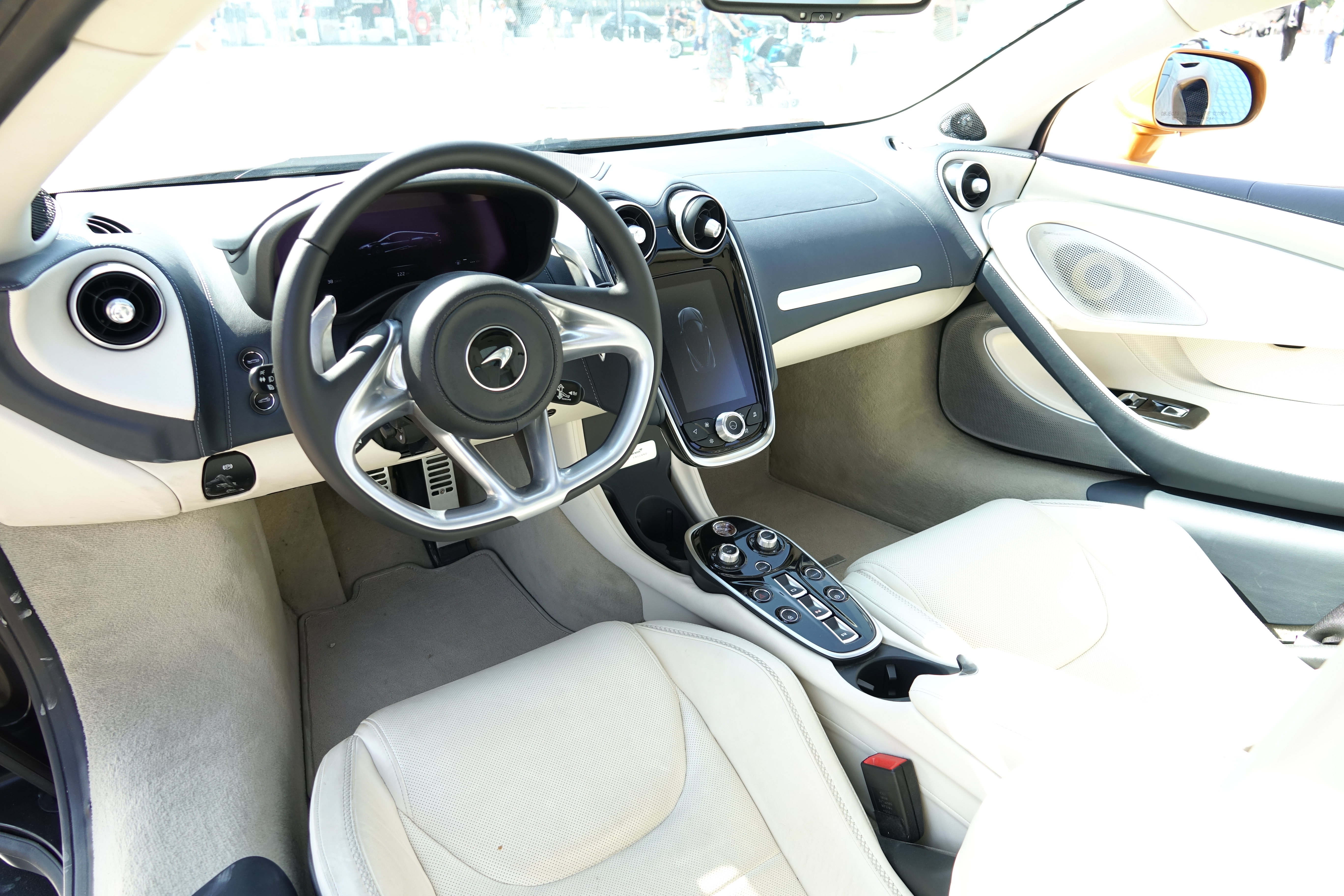 McLaren GT (Gran Tourer) au Chantilly Arts & Elegance Richard Mille 2019